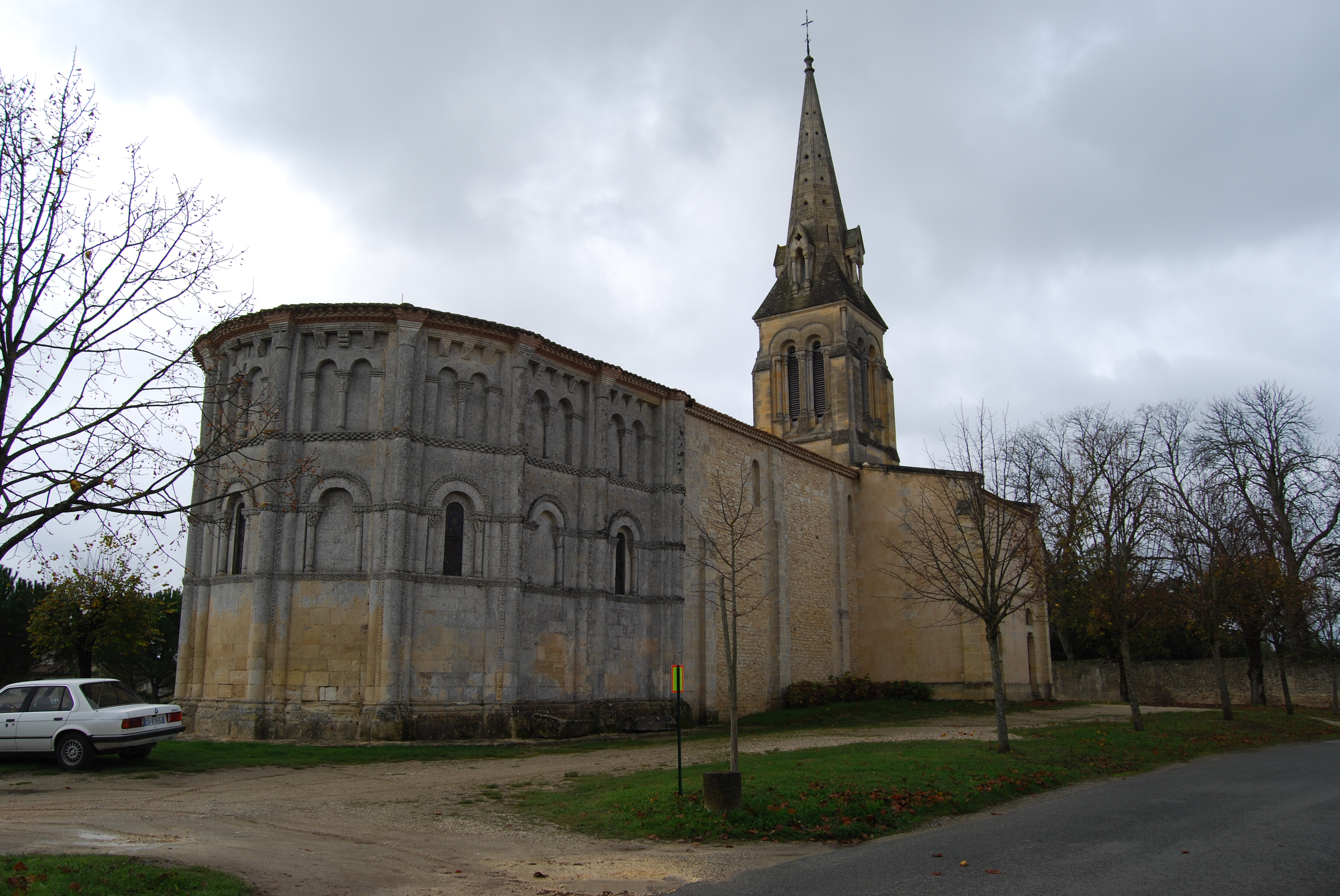 Église Saint-Pierre-ès-Liens du Haut-Langoiran, (Classé, 1908) .